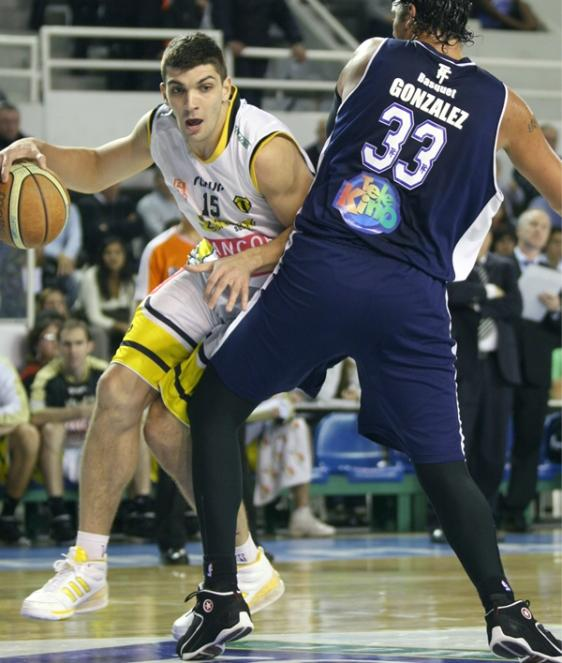 El jugador uruguayo de básquet, Esteban Batista